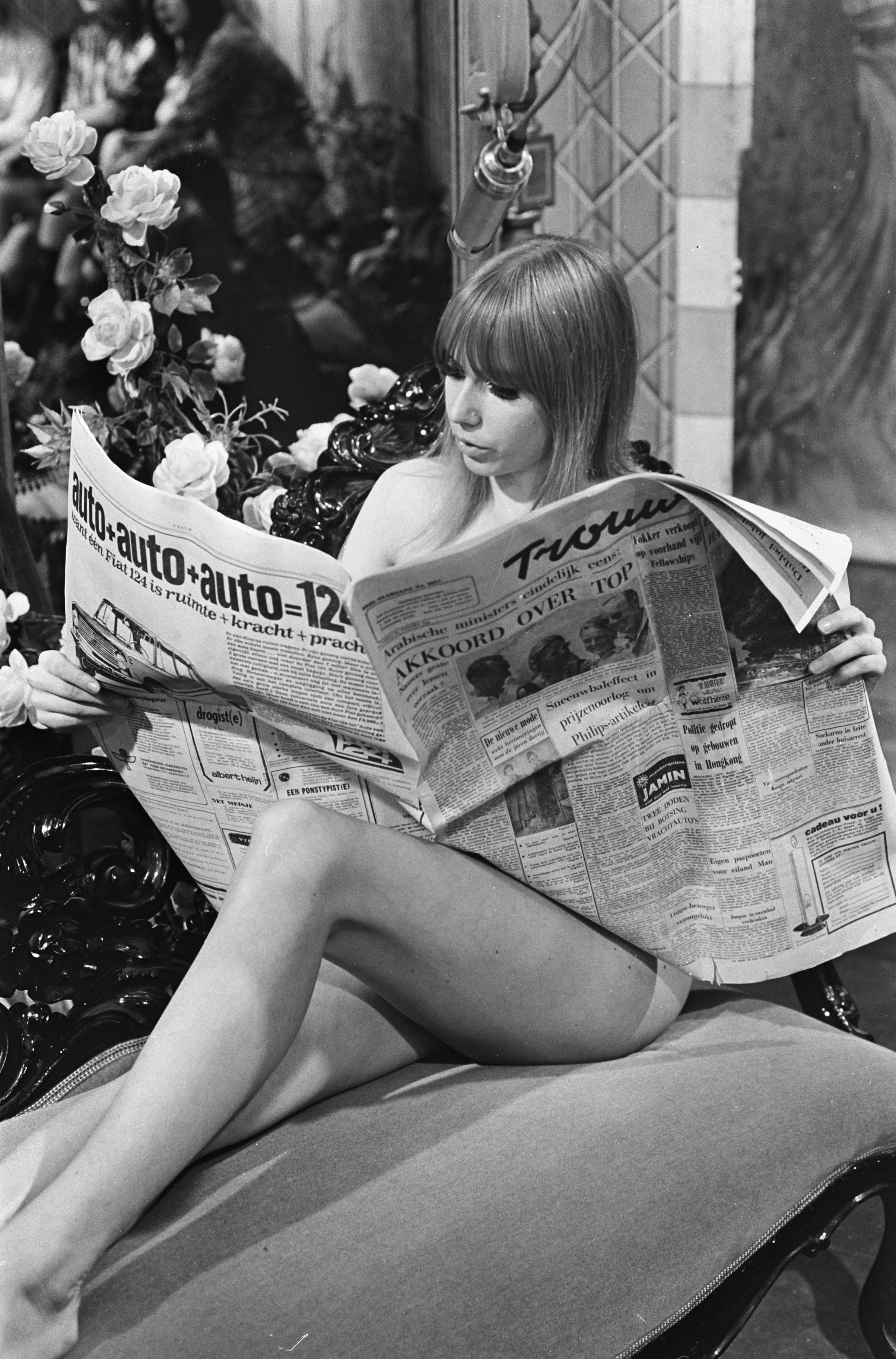 "Hoepla" voor VPRO-TV. Phil Bloom op sofa met de Trouw. Datum: 22 september 1967